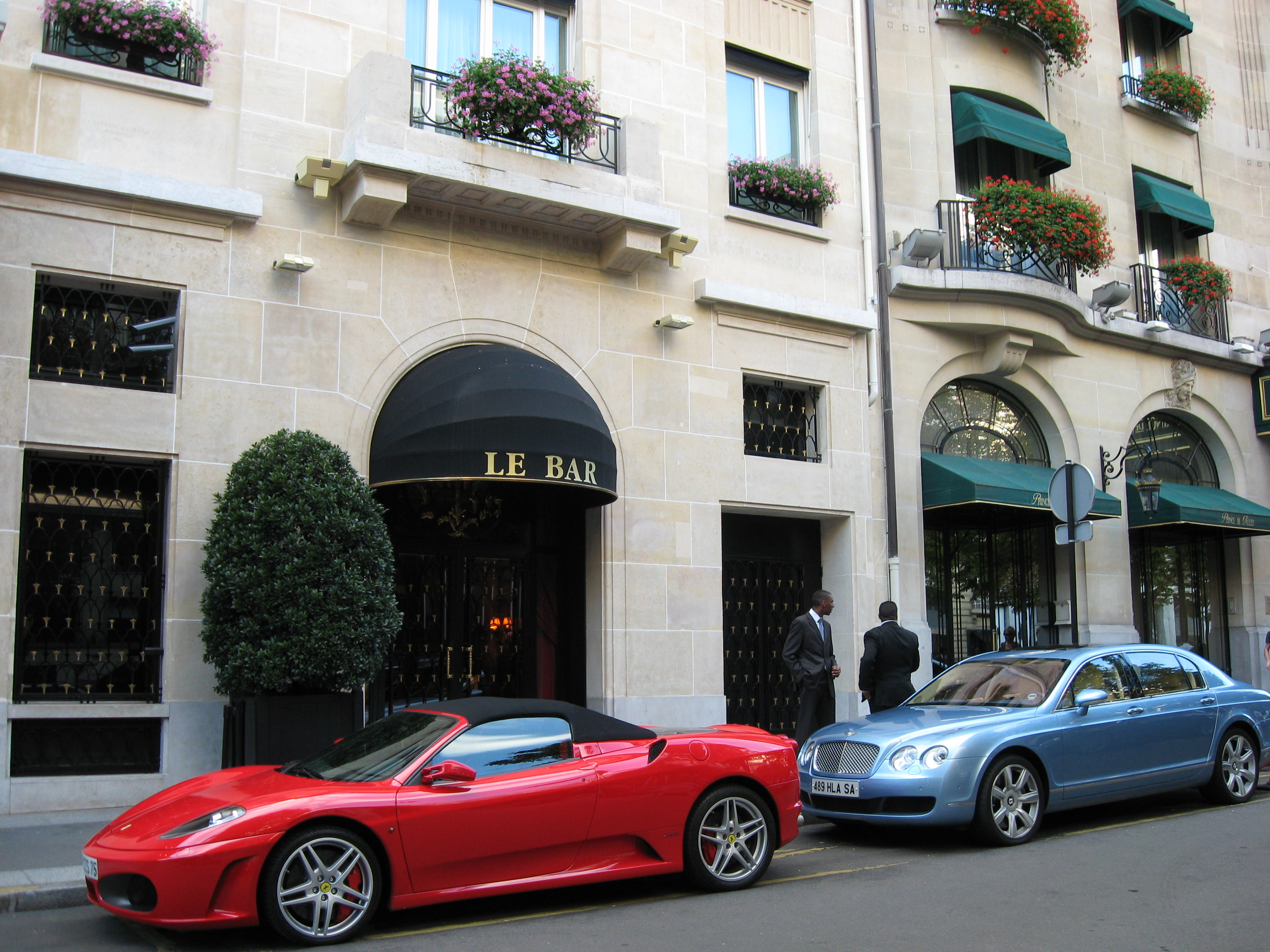 Hôtel George-V Paris